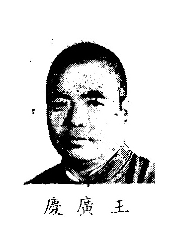 中文（中国大陆）: 制憲國民大會代表